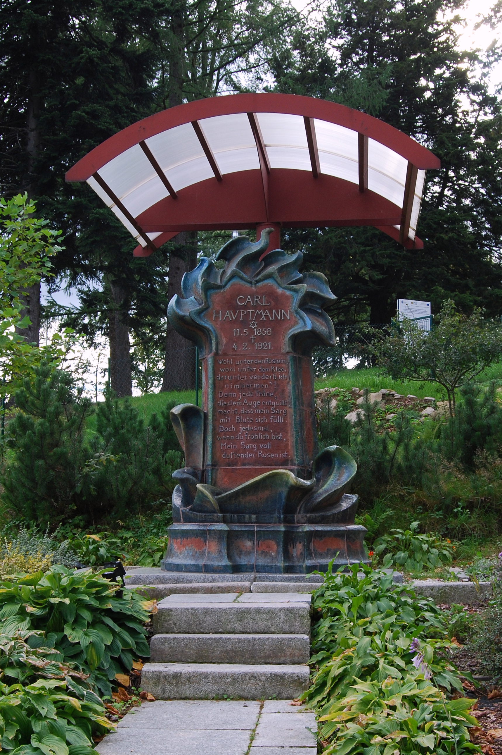 Zrekonstruowany pomnik nagrobny Carla Hauptmanna autorstwa Hansa i Marlene Poelzigów. Na miejscu pomnika na cmentarzu ewangelickim położono pamiątkową płytę.